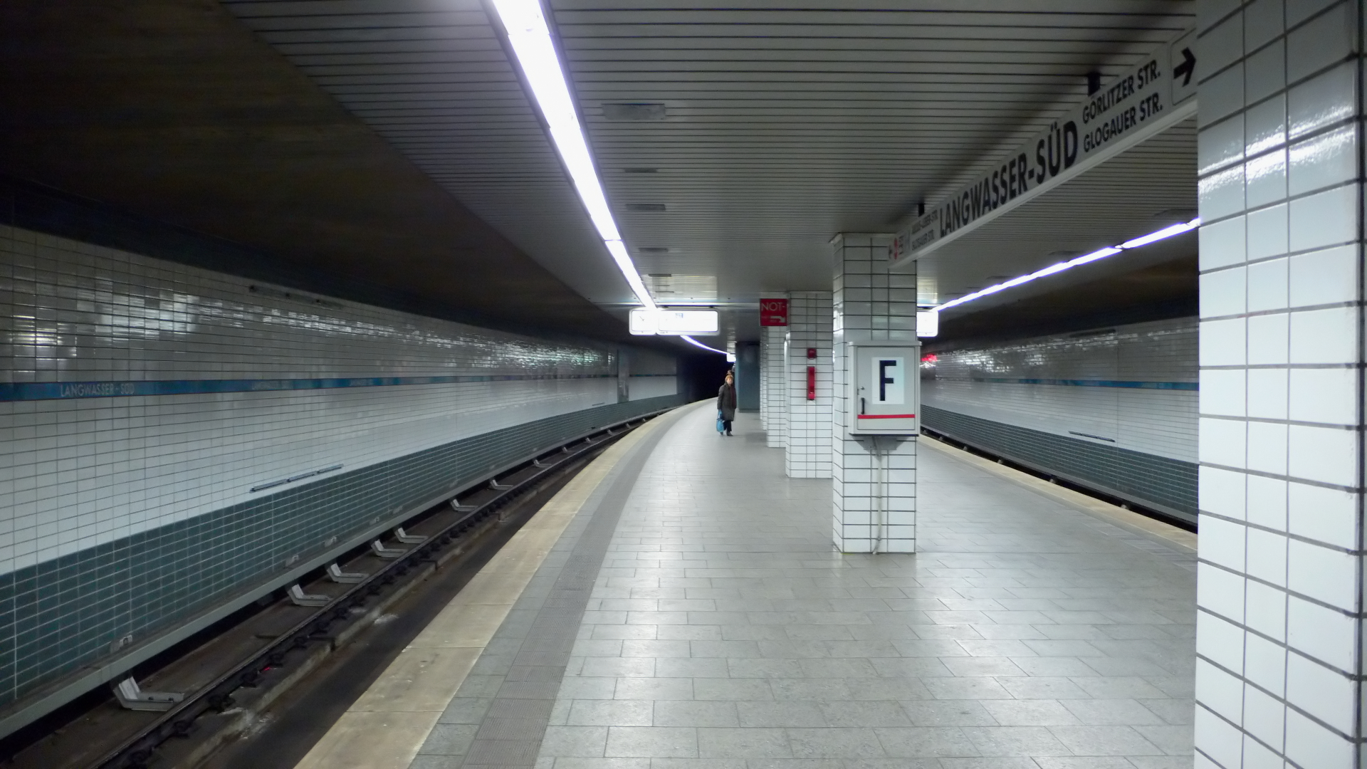 U-Bahnhof Langwasser Süd der U-Bahn Nürnberg, Bahnsteigebene, Blick von Nordwesten